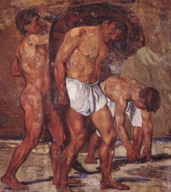 detail